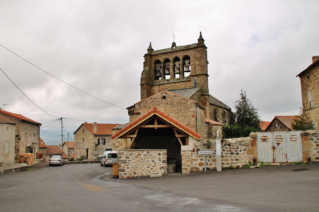 Le Lavoir et l'église St Haon